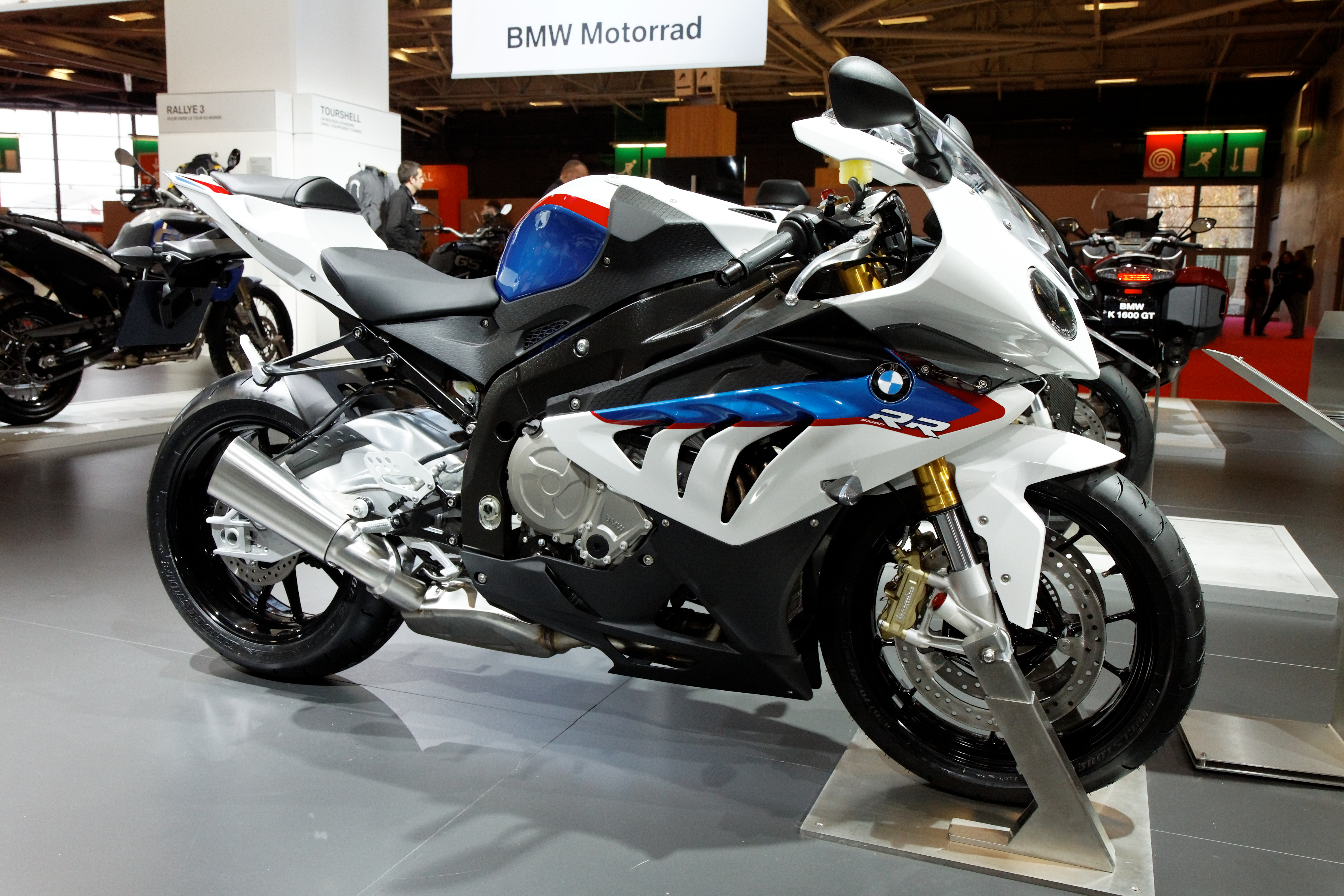 BMW - S1000 RR